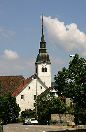 Pfarrkirche St.Peter in Brislach